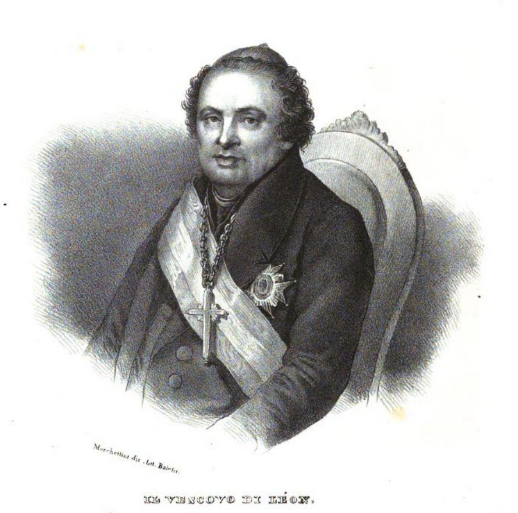 Joaquín Abarca. Obispo de León. Dibujo de Isidoro Magues. Publicado en Don Carlos e i suoi Difensori. Firenze 1837 "En el dominio público por antigüedad (1837): ".